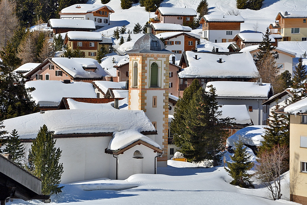 Bivio GR mit der katholischen Pfarrkirche